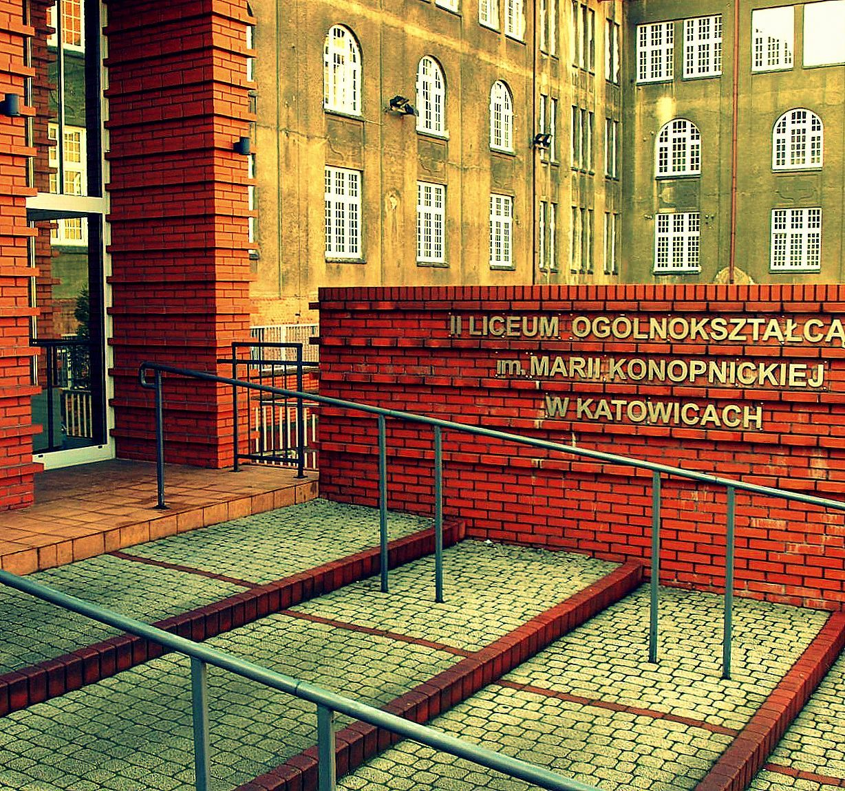 II Liceum Ogólnokształcące im. Marii Konopnickiej w Katowicach